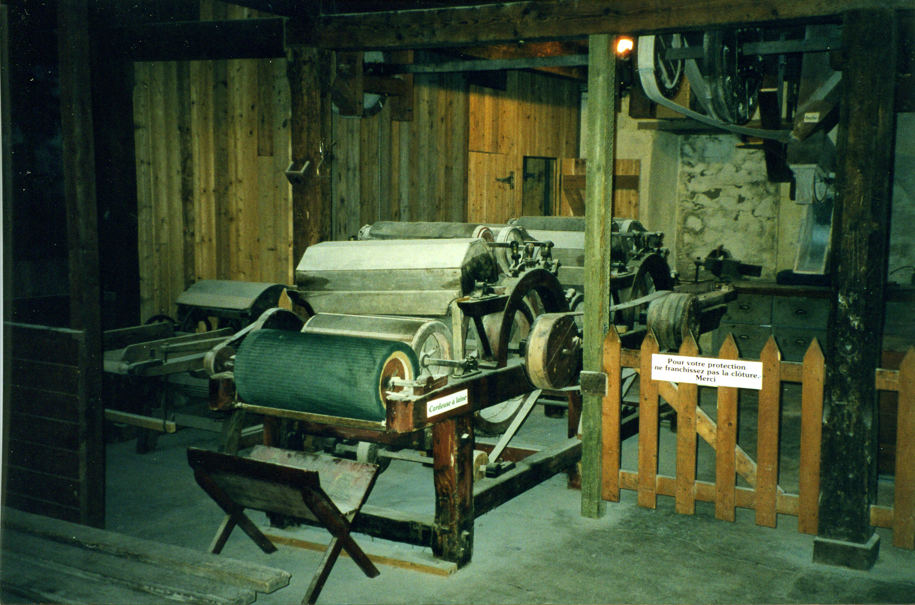 Cardes du Moulin de Saint-Roch-des-Aulnaies (Chaudière-Appalaches, Québec). Moulin à eau; moulin à farine.